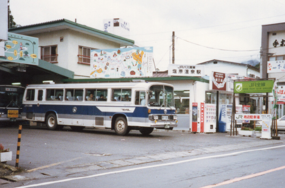 塩原温泉駅を発車する路線車